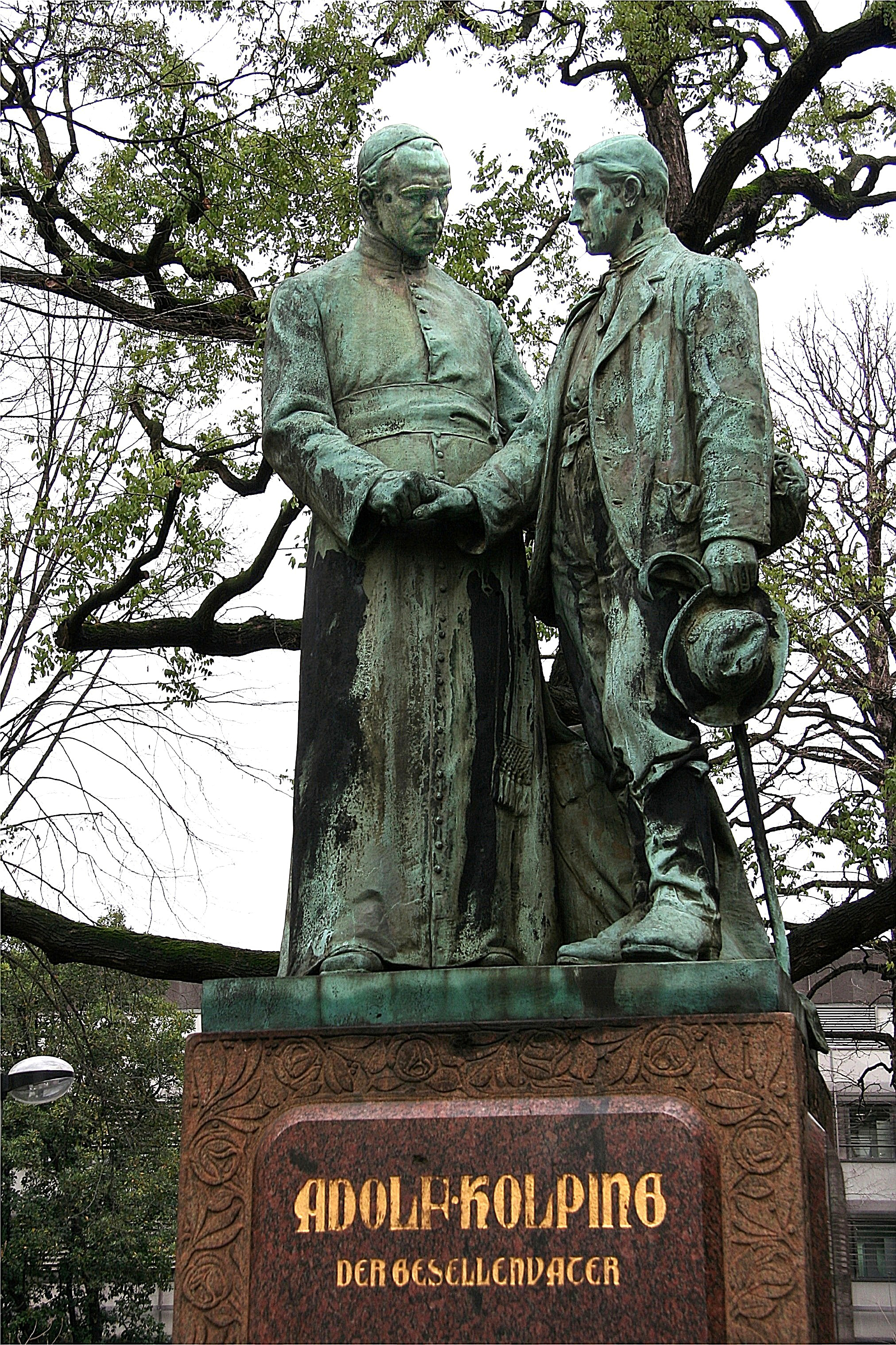 Kolping-Denkmal in Köln von Joh. L. Schreiner, München, 1903. Das Denkmal zeigt den „Gesellenvater“ Kolping mit einem Wanderburschen.